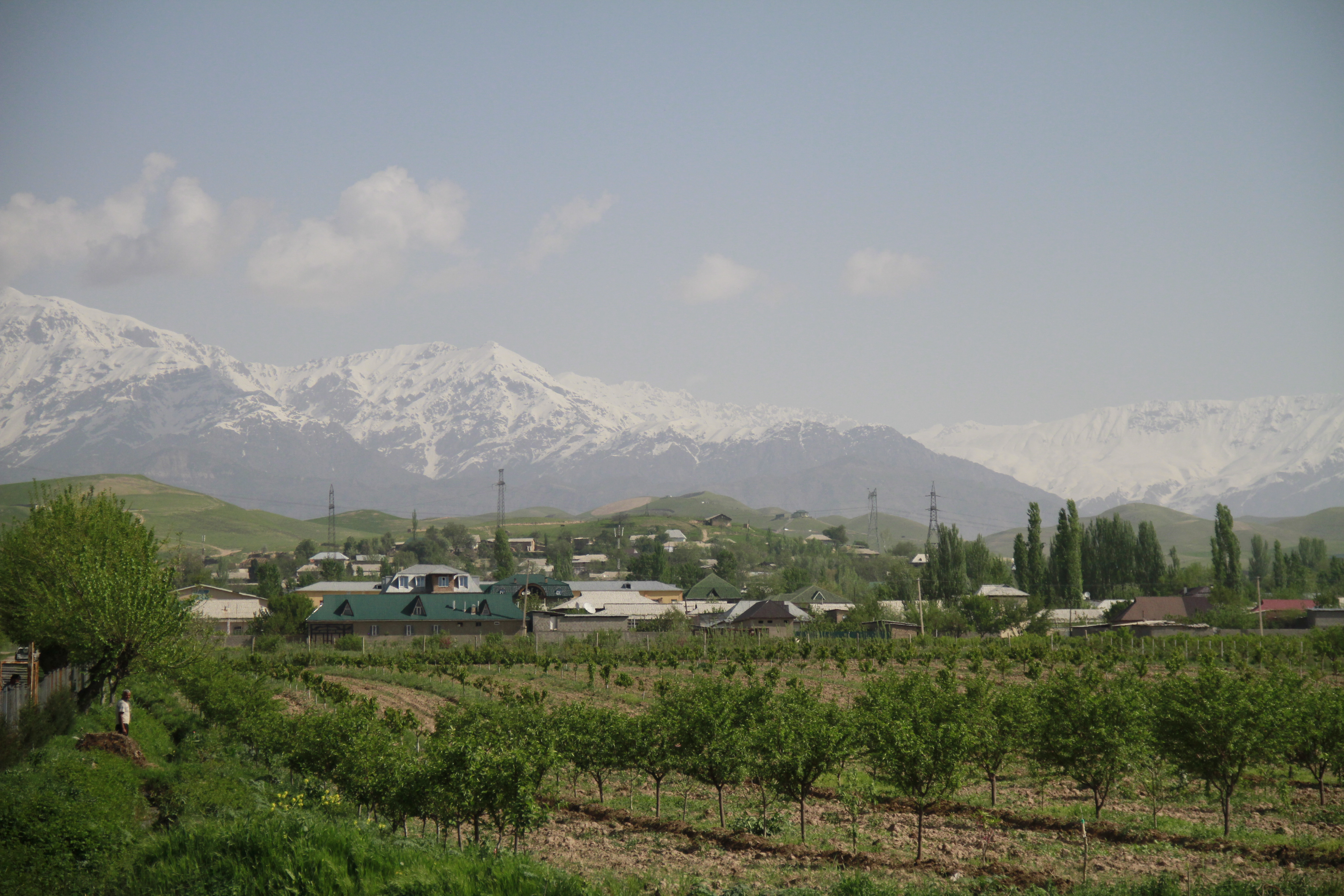 Тоҷикӣ: Ш. Ҳисор, д. Ғурёт (5)